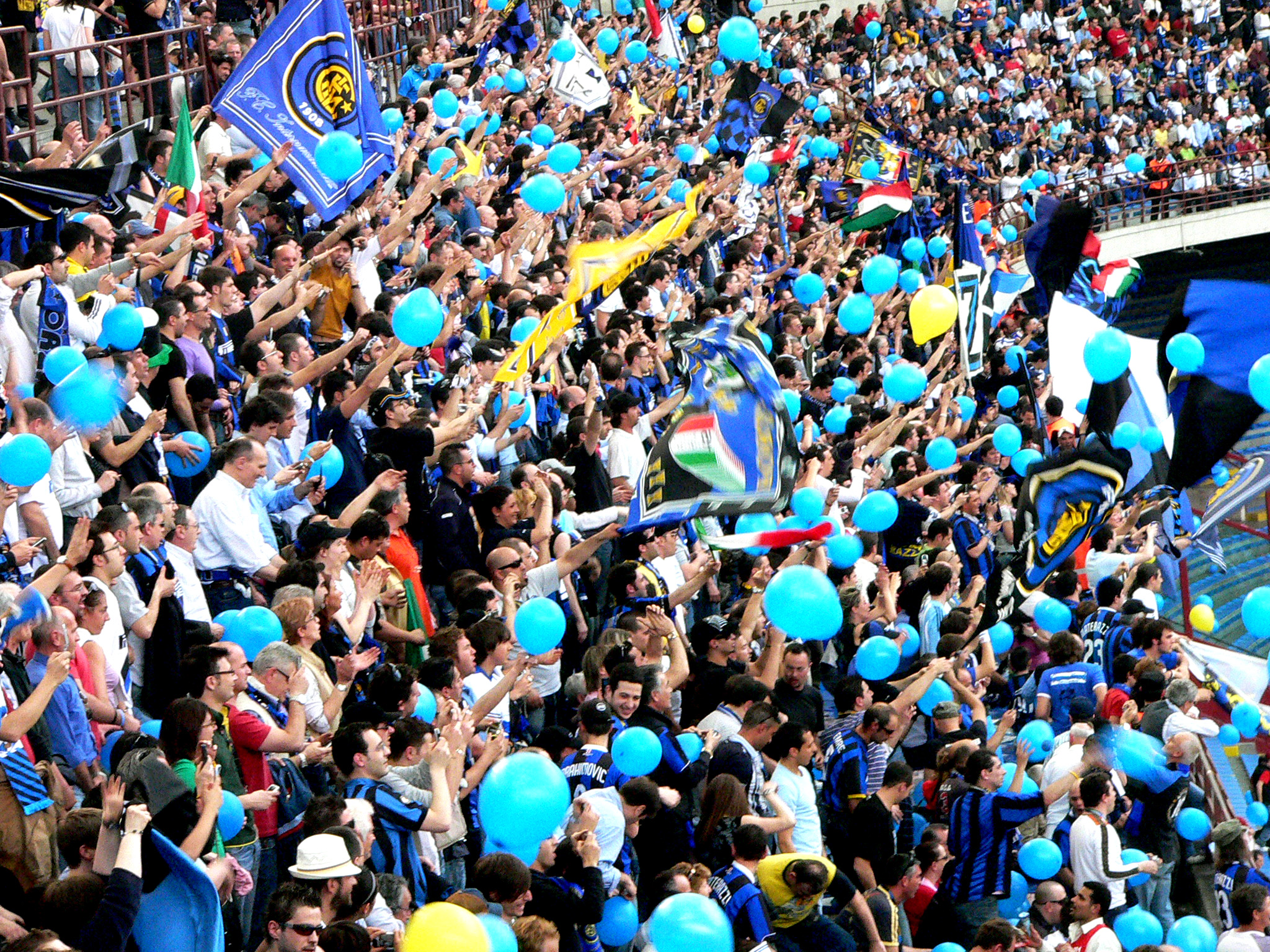 Internazionale fans celebrating their 2007 scudetto.